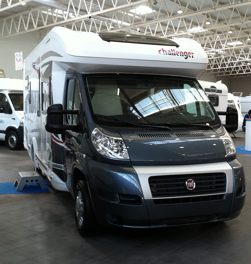 Autocaravana Perfilada